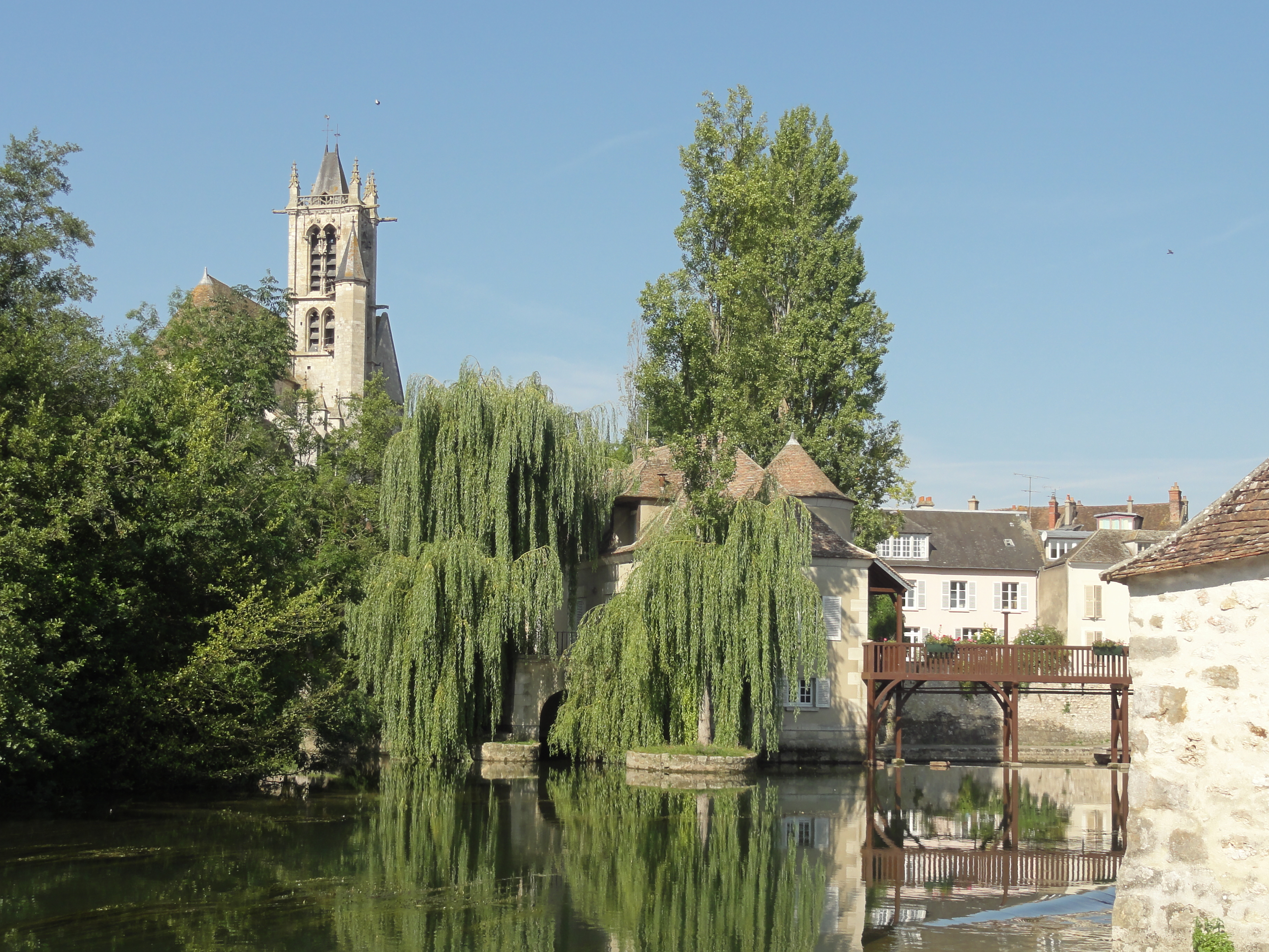 Vue depuis le Loing.